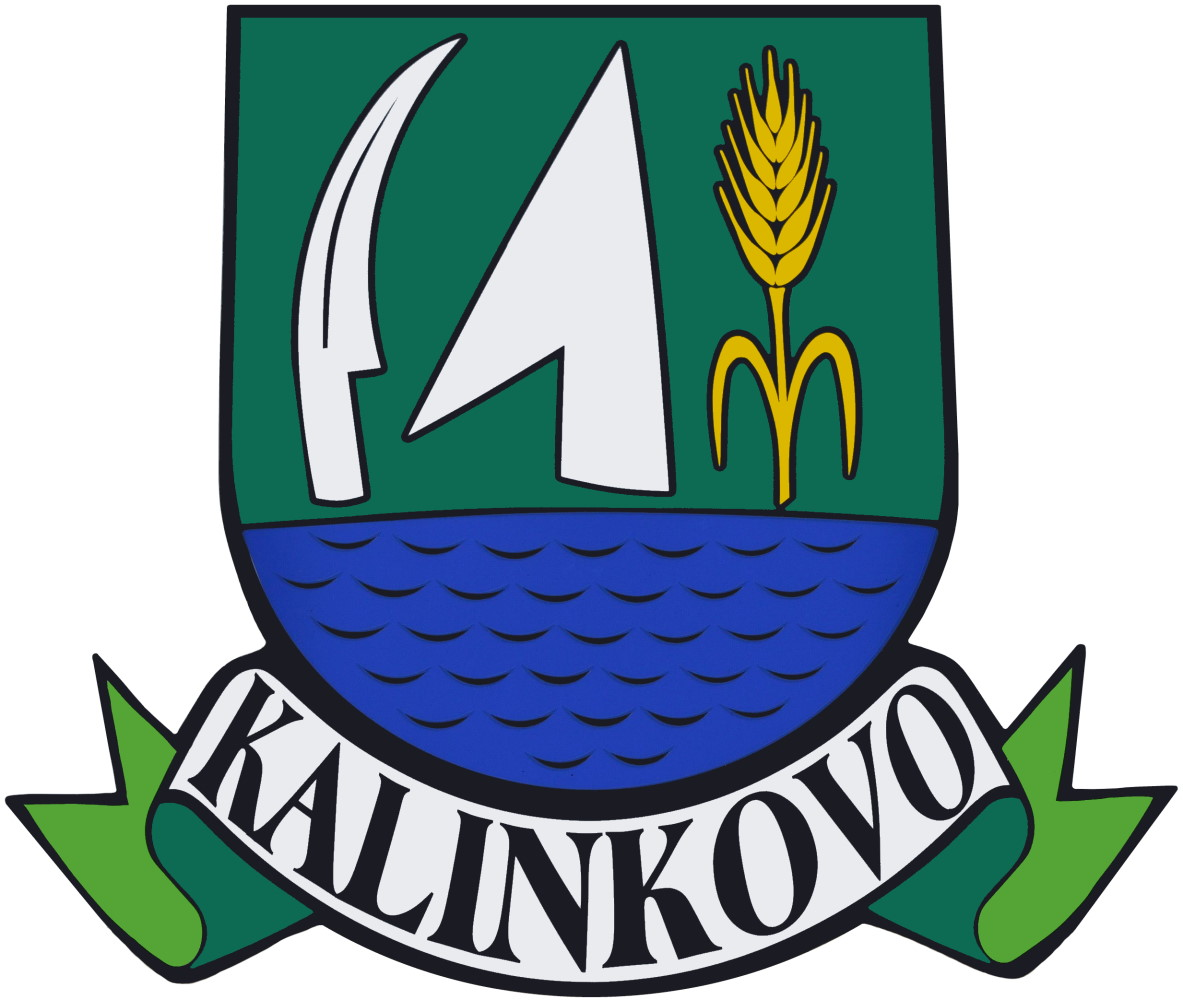 Erb Kalinkova